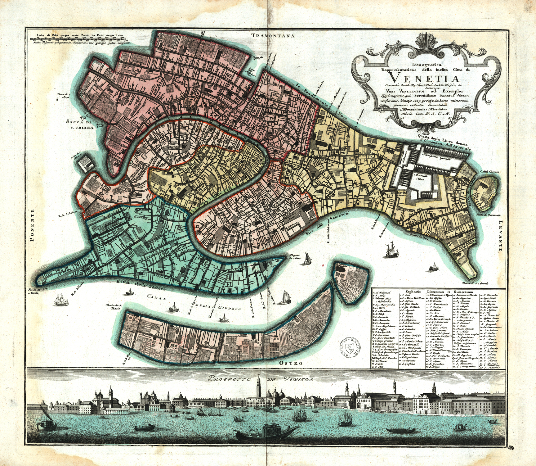 Server vom Projekt der Deutschen Forschungsgemeinschaft (DFG) "Retrospektive Digitalisierung des historischen Kartenbestandes der Staats- und Universitätsbibliothek Bremen")